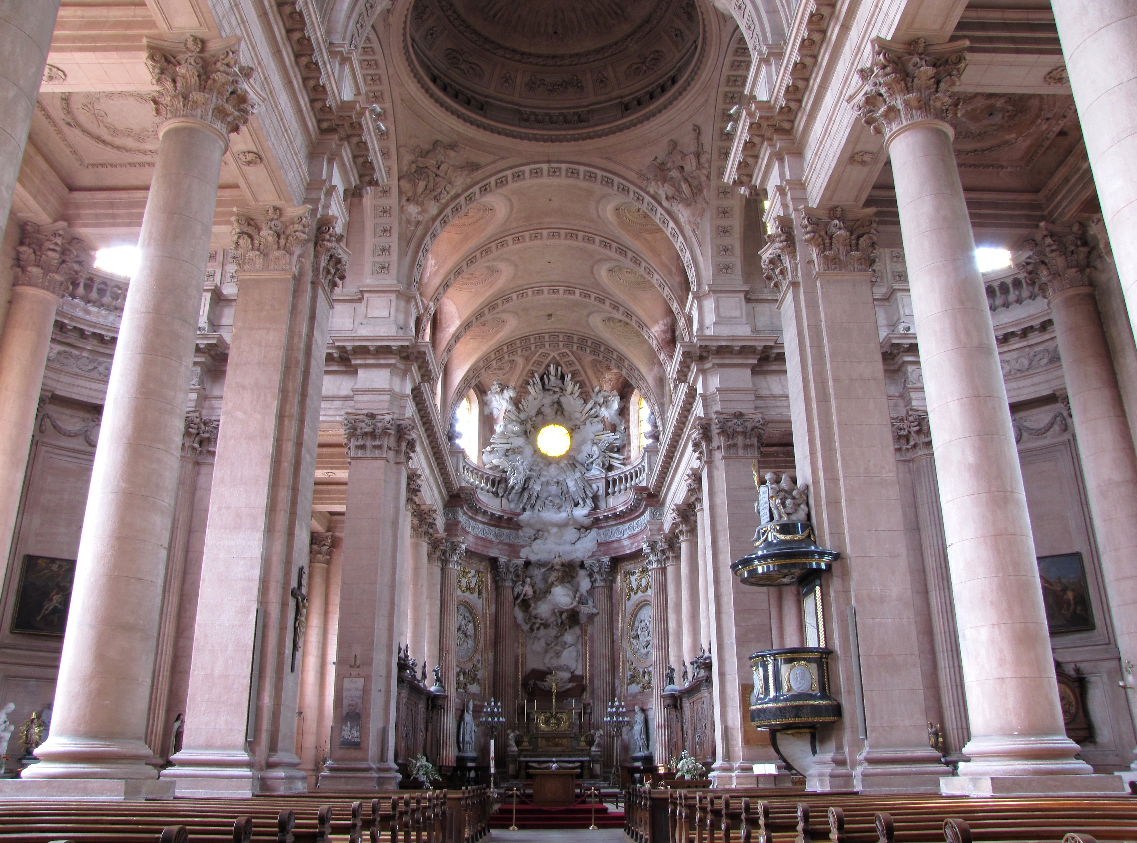 Alsace, Haut-Rhin, Église abbatiale Notre-Dame de Guebwiller (1768-1785), place Jeanne-d'Arc (PA00085438, IA00054832).Vue intérieure de la nef vers le chœur.